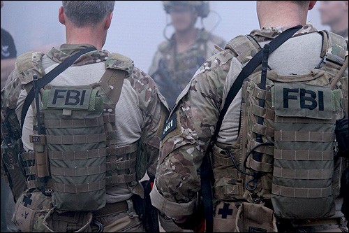 Zwei Agents des Hostage Rescue Team des FBI.